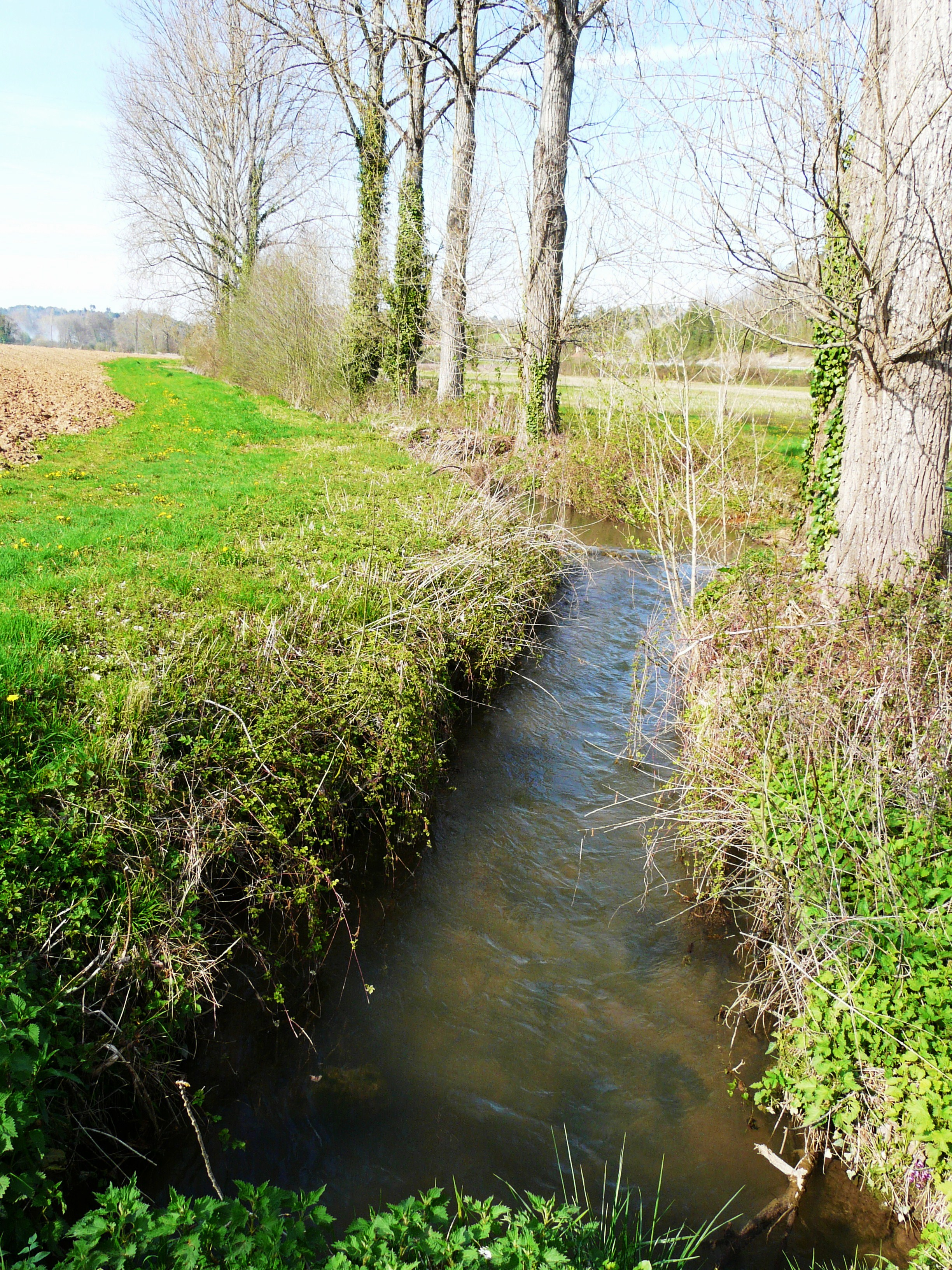 La Seyze près du lieu-dit Parouty entre Queyssac (à gauche) et Lamonzie-Montastruc (à droite), Dordogne, France. Vue vers l'amont.